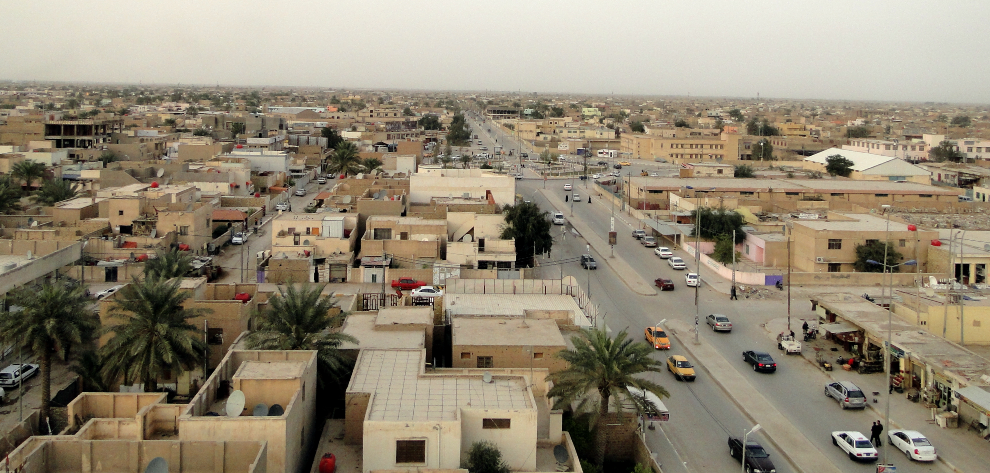 الديوانية من مرتفع